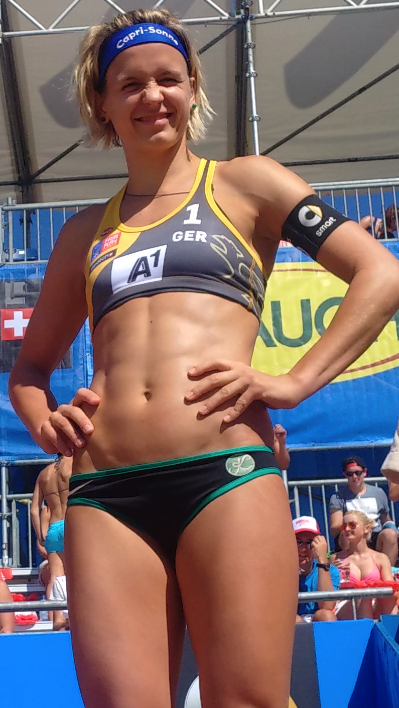 Laura Ludwig in Klagenfurt 2015 vorm Halbfinale